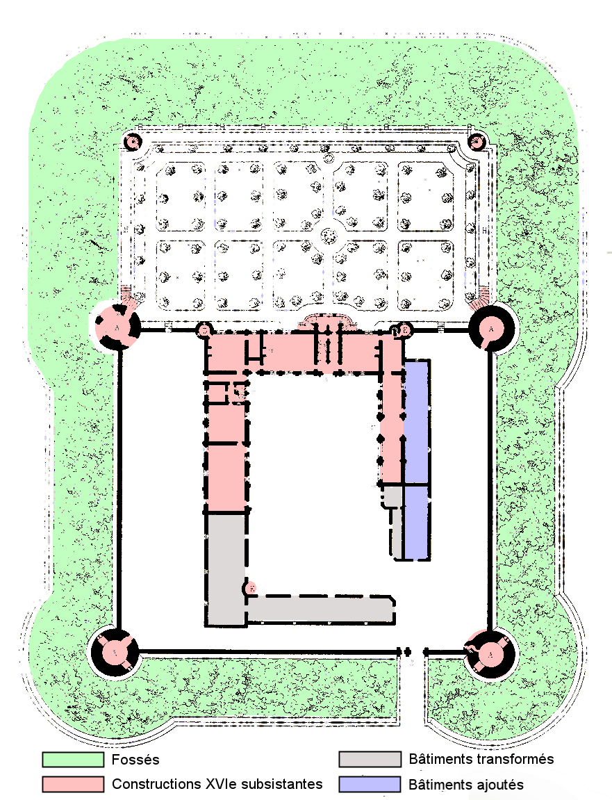 Plan colorisé avec légende du château de Nantouillet